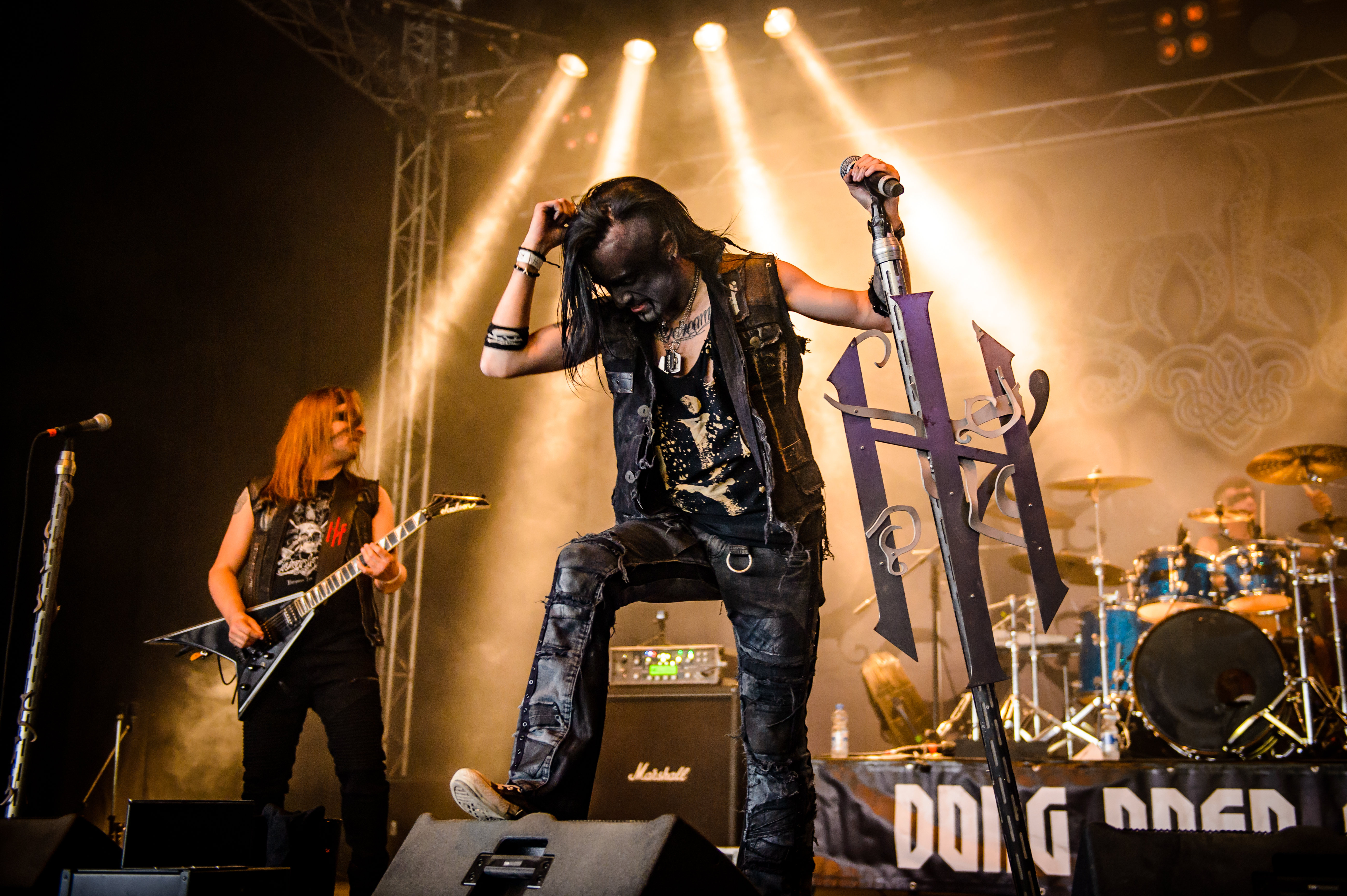 'Dong Open Air 2017; Neukirchen-Vluyn': 'Elvenking'